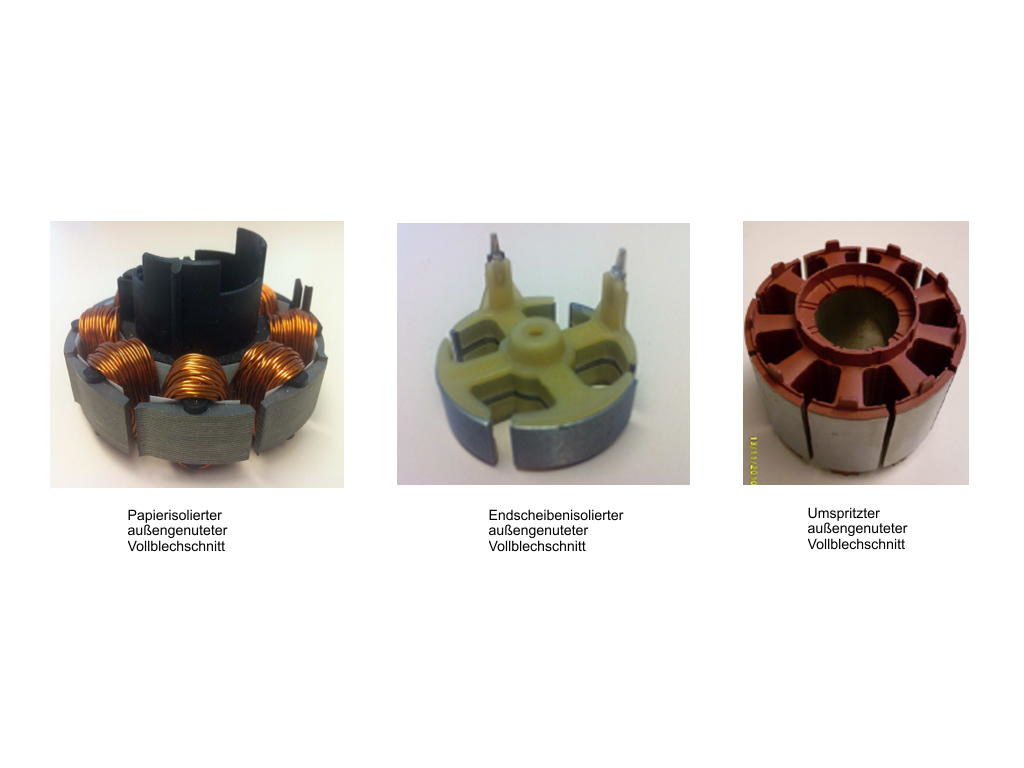 Verschieden isolierte Vollblechschnitte